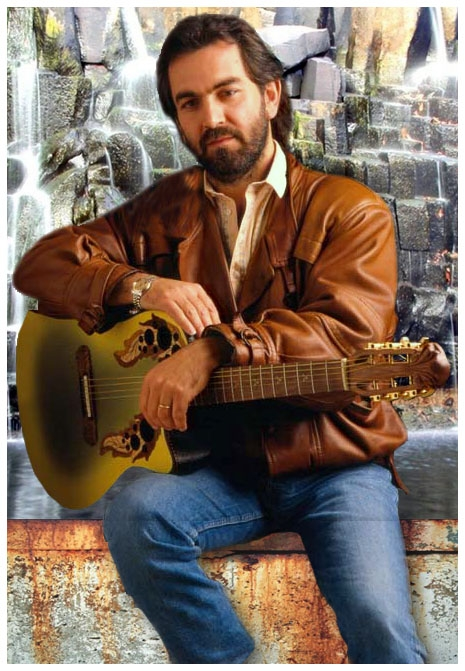 Marcel DADI - Photo : Pierre Thouvenot